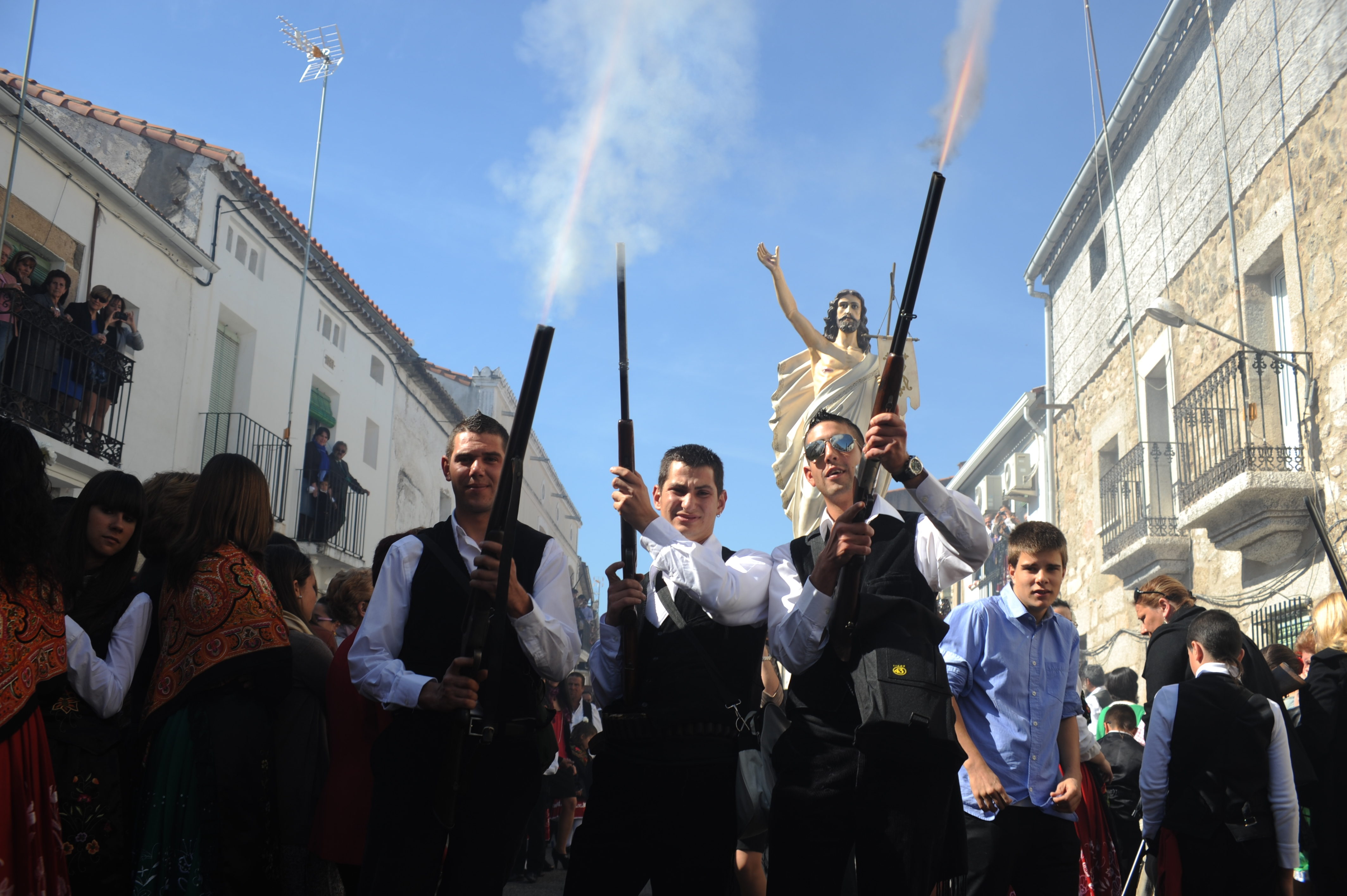 Domingo de los Tiros en Zarza la Mayor (Cáceres)